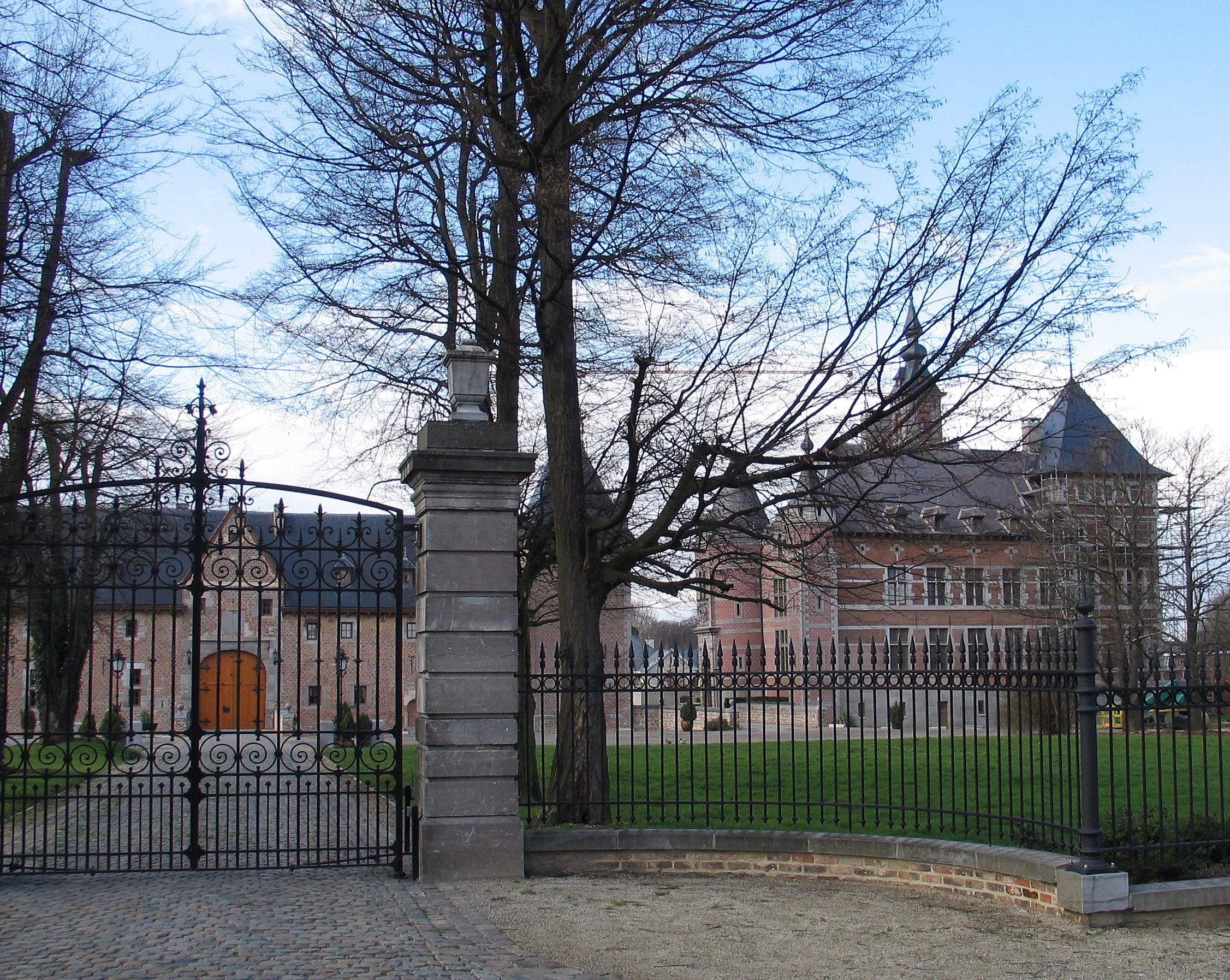 kasteel van Ordingen, in Ordingen, België